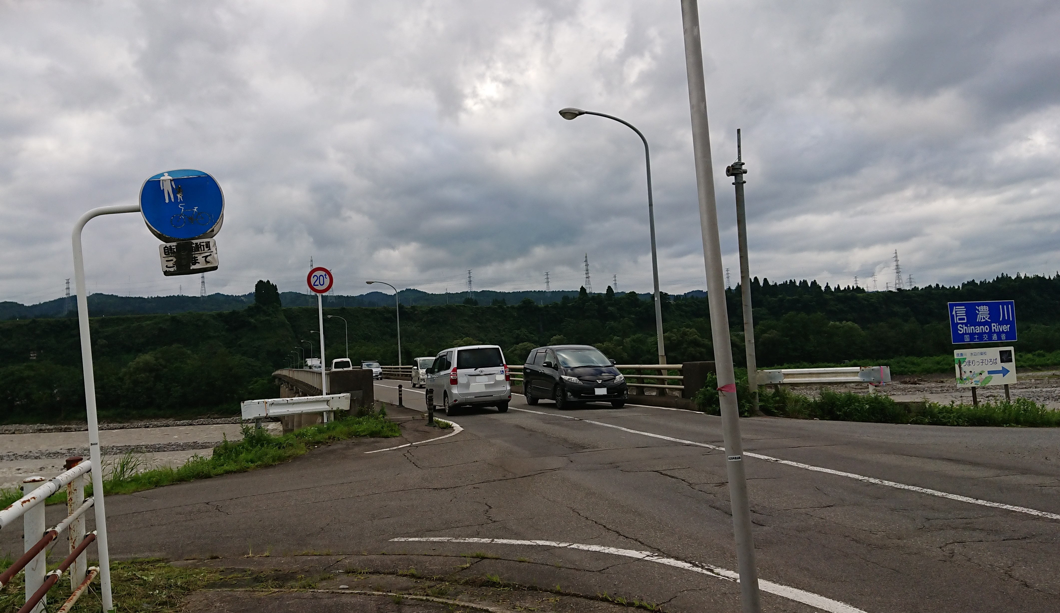 十日町橋を東端より撮影。 新潟県十日町市、2020年7月30日。